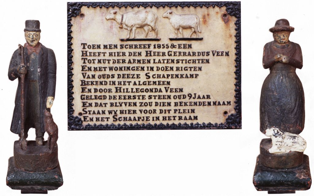 Plaquette en de beeldjes uit het Schapenkamp. Hangen nu in het Gooisch Museum.